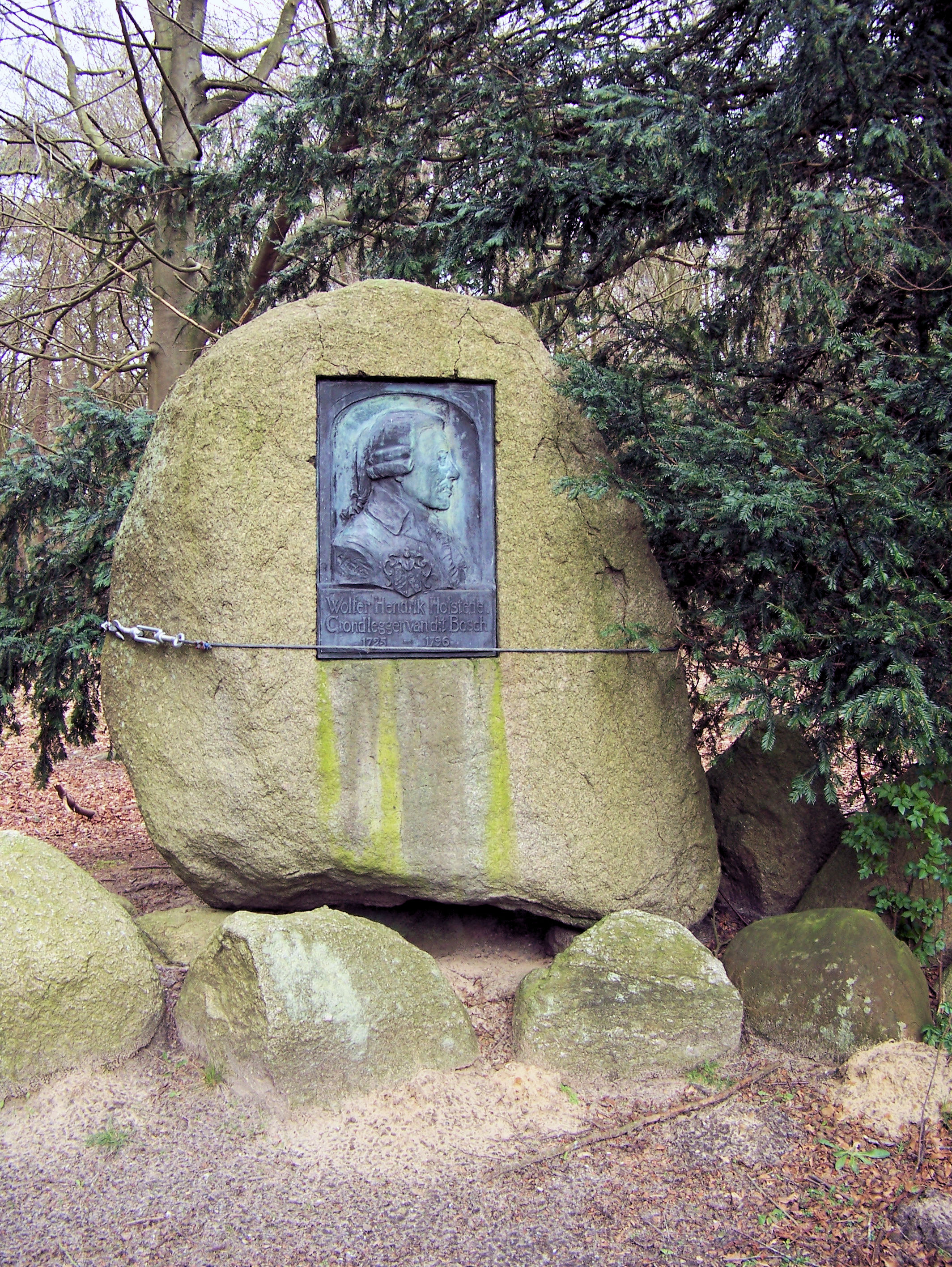 Monument Wolter Hofstede in Asserbos, door Johan Keller (1939)